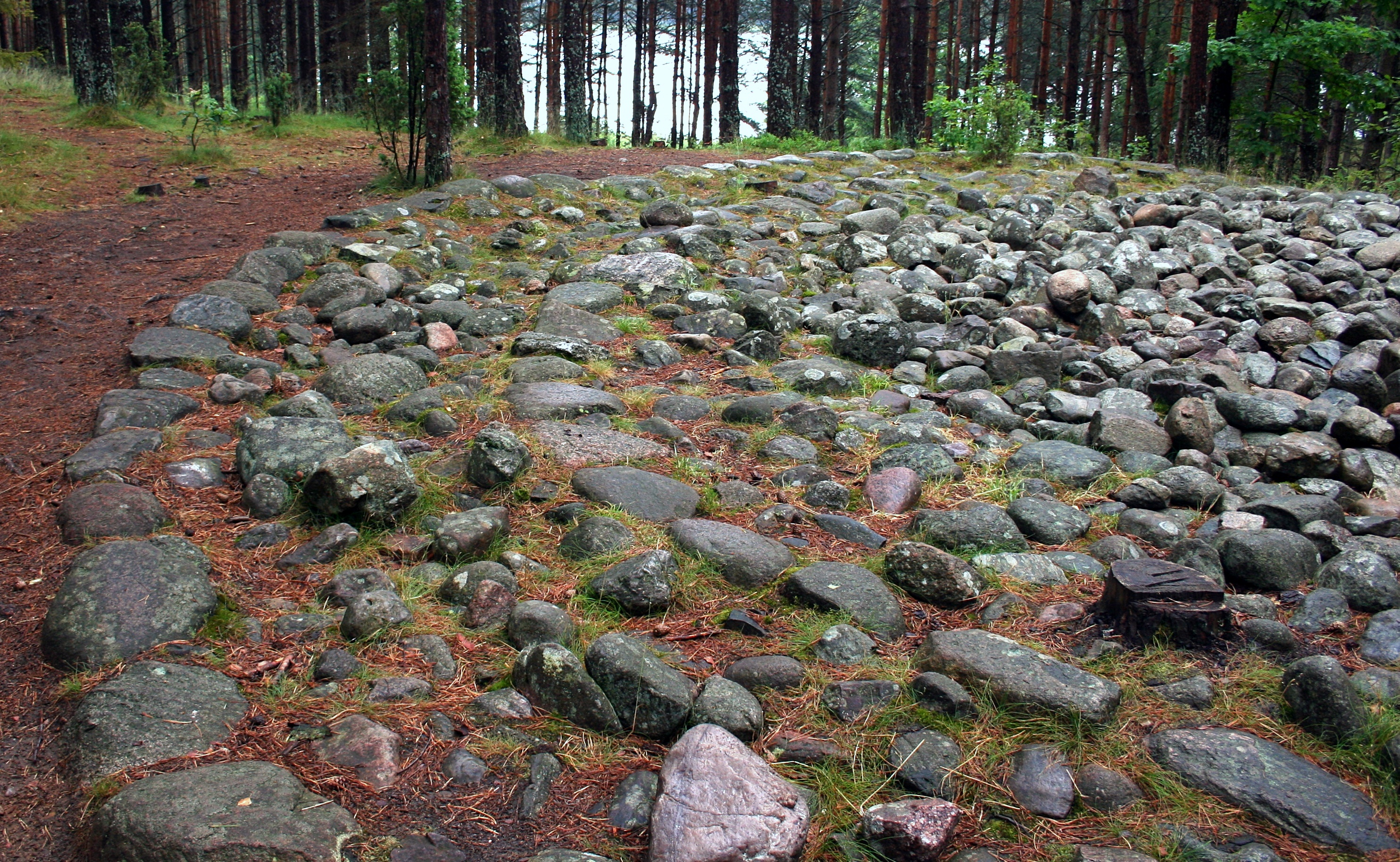 Fragment kręgu na cmentarzysku gotów w Węsiorach